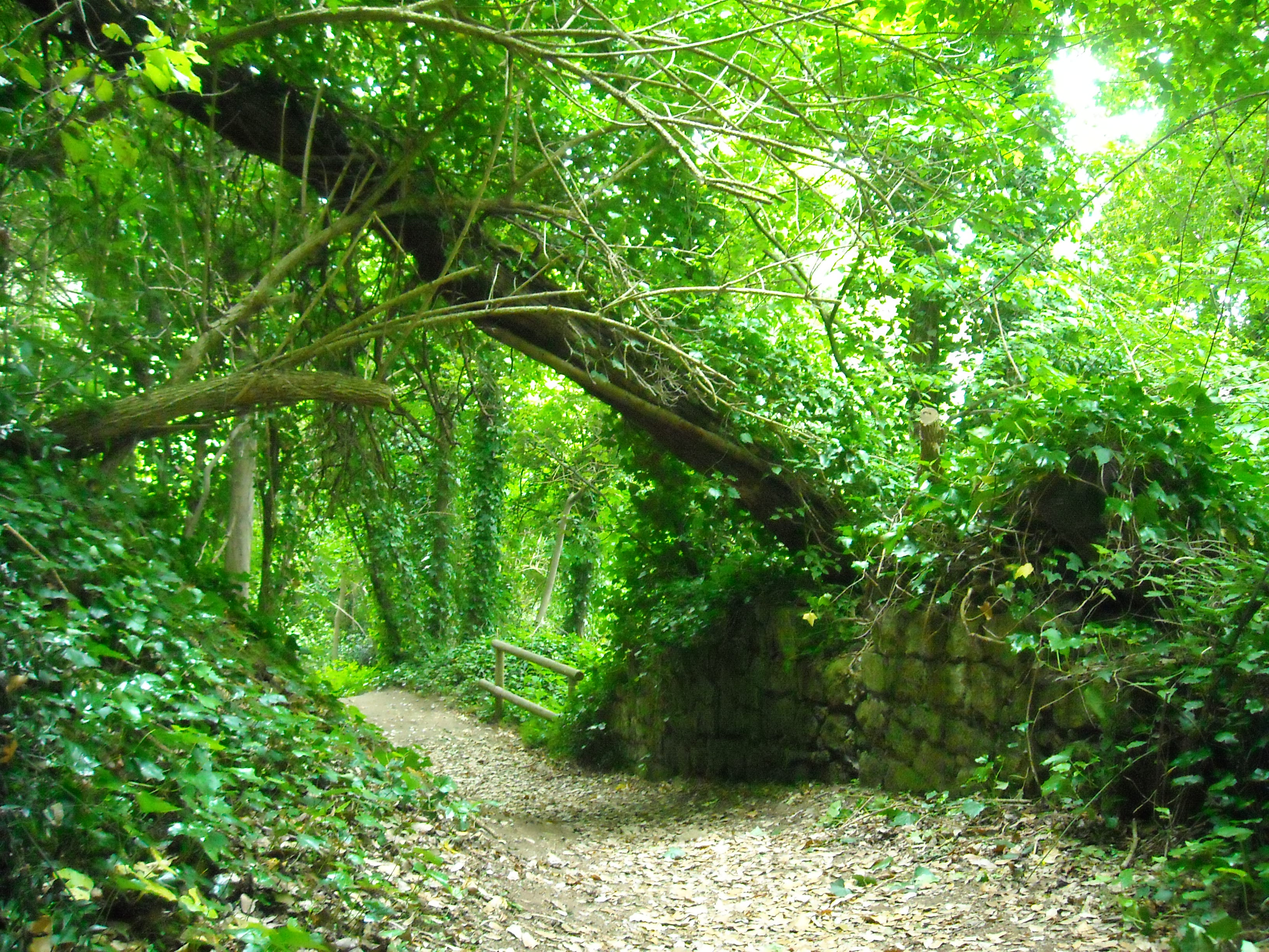 Cratere degli Astroni This is a photo of a monument which is part of cultural heritage of Italy. The authorisation for taking photos of this object was provided by the World Wide Fund for Nature Italy.